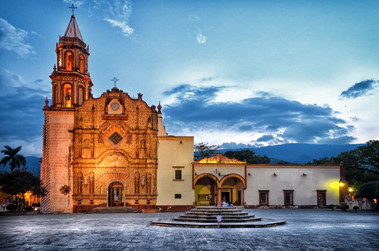 Misión Santiago de Jalpan, Qro. Mexico